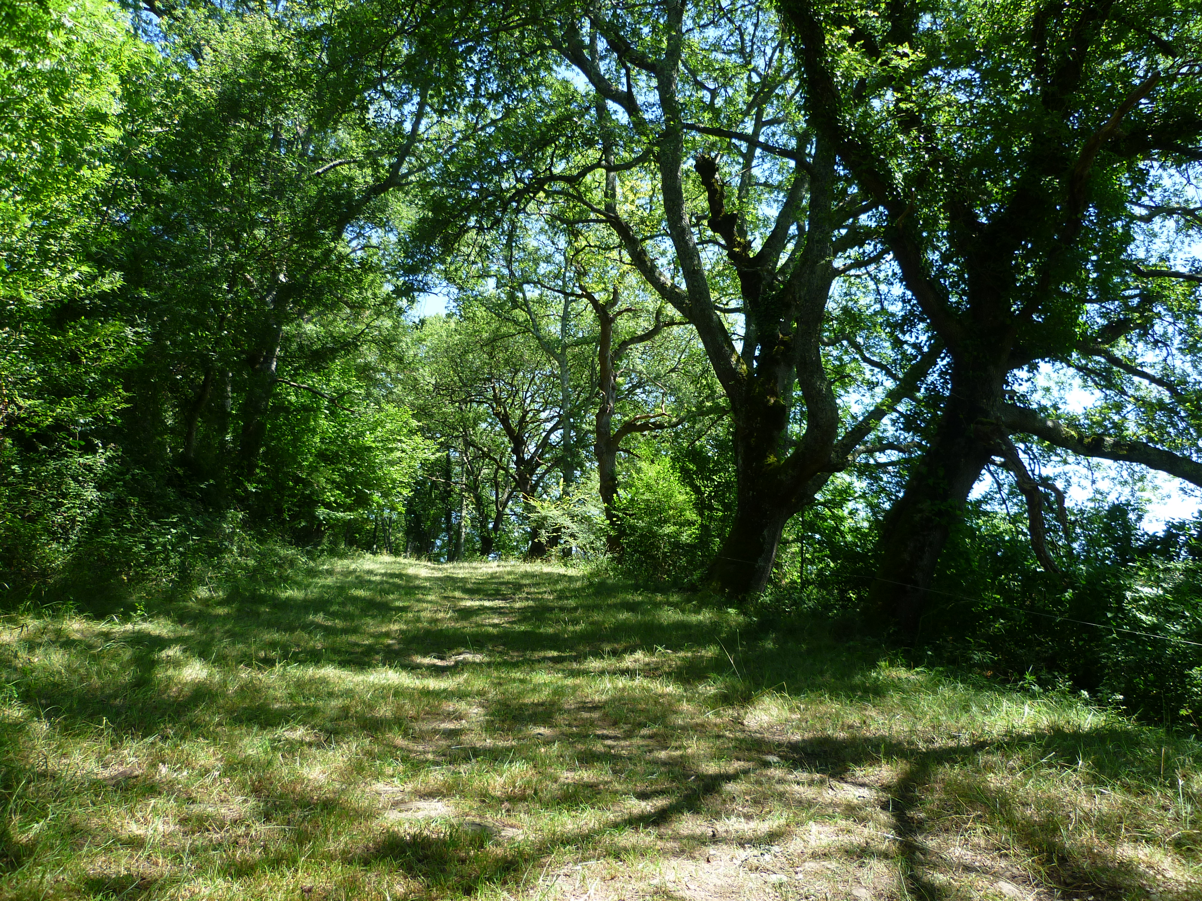 Sur la voie romaine à Montesquieu-Avantès (Ariège, France).